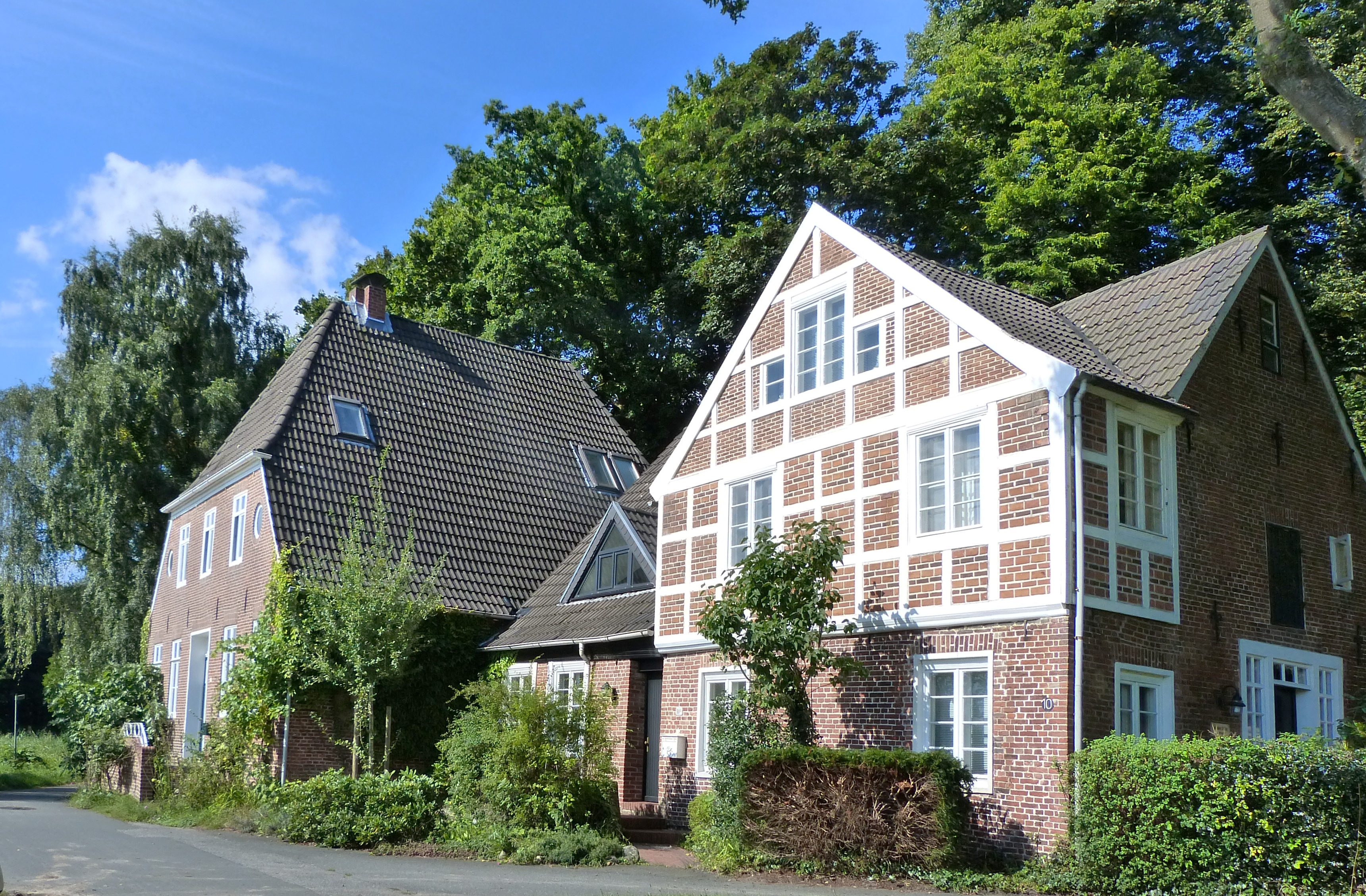 Raschens Werft in Bremen, Admiral-Brommy-Weg 10-11Das abgebildete Objekt ist ein geschütztes Kulturdenkmal in der Freien Hansestadt Bremen, mit der Nr. 2516 beim Landesamt für Denkmalpflege registriert.